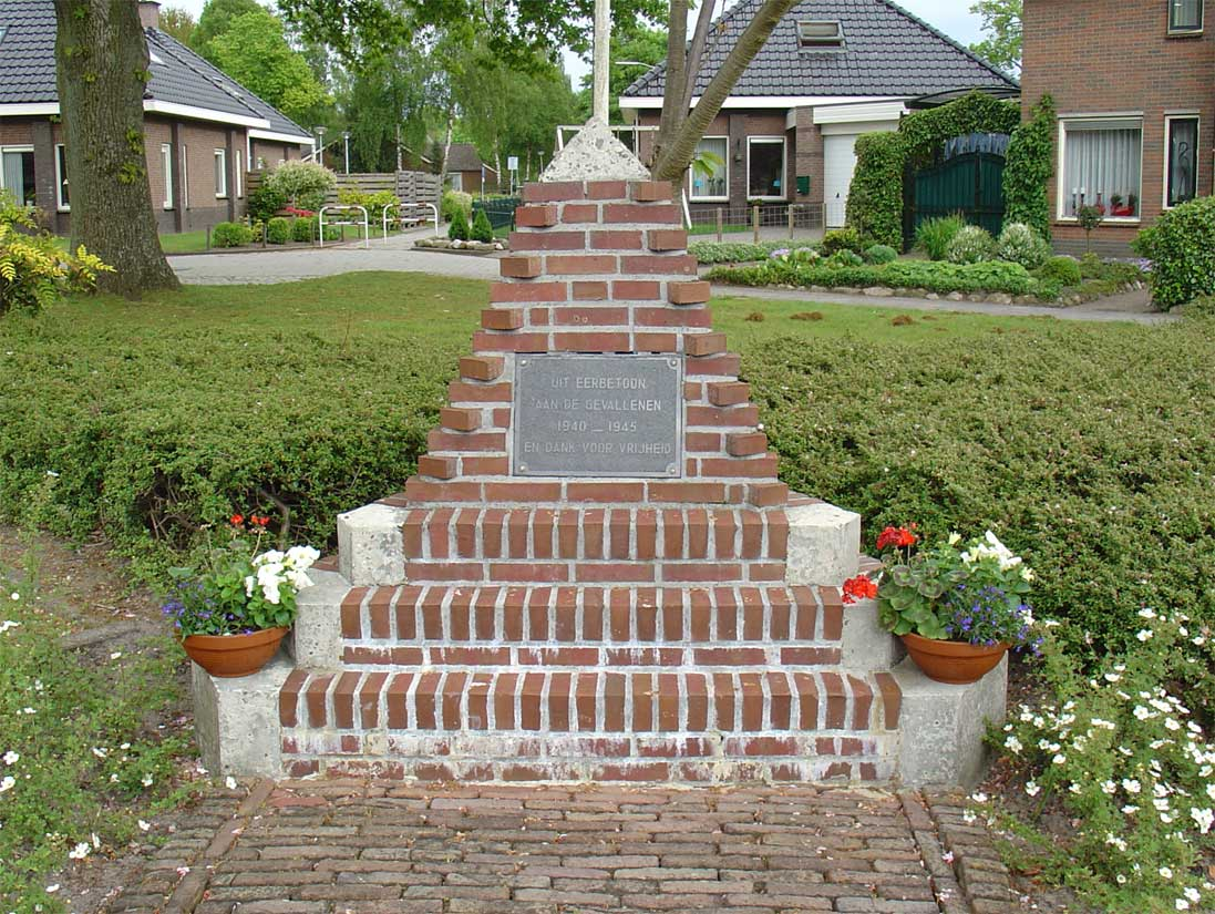 Oorlogsmonument - Wagenspoor, 9584CB, Mussel